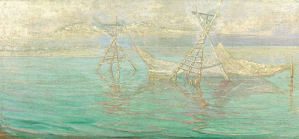 Δίχτυα